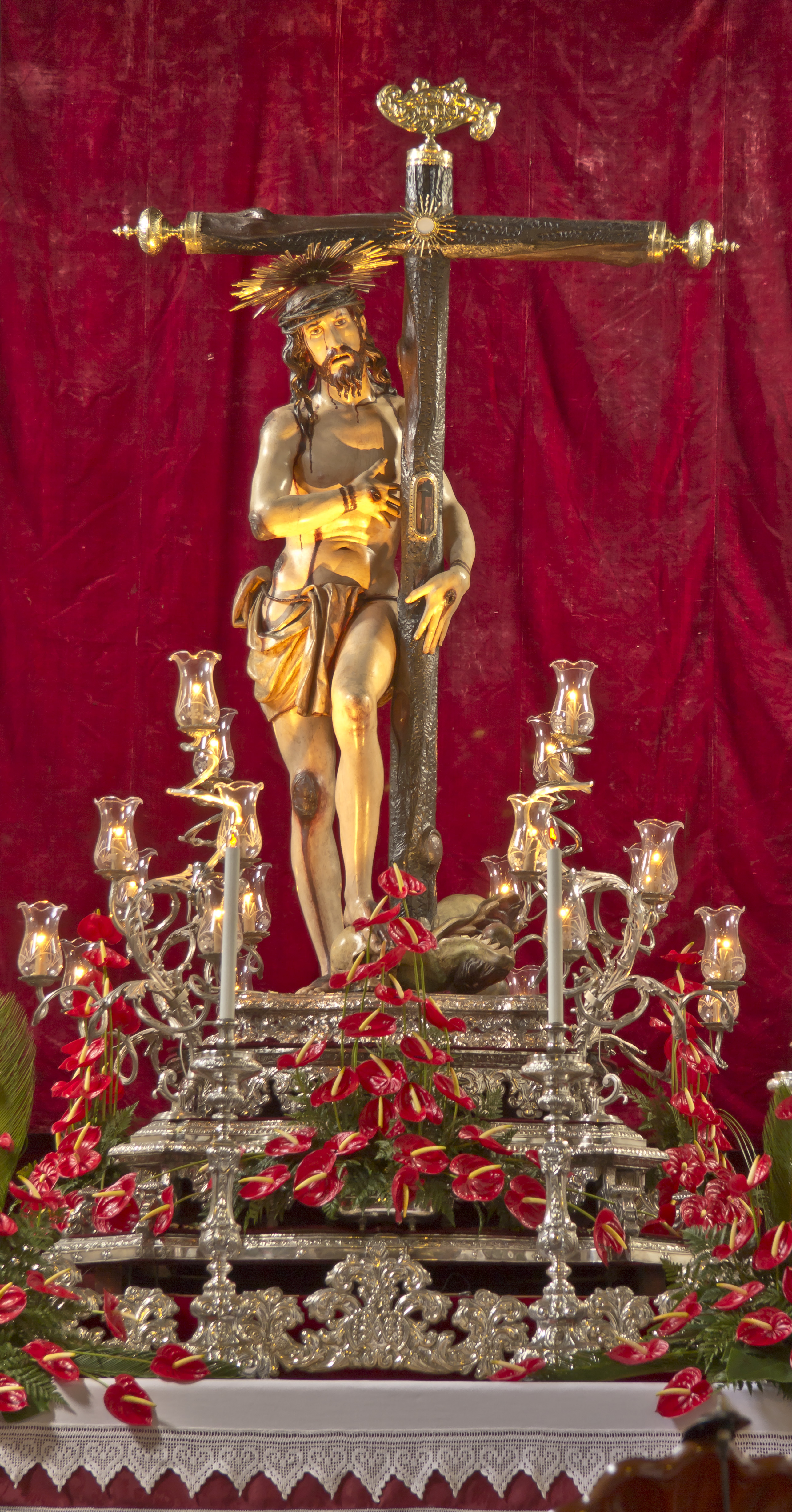 Cristo de los Dolores (Cristo de Tacoronte), escultura de bulto redondo, año 1661, autor anónimo. Ubicación: Retablo Mayor. La Iglesia del Cristo Tacoronte.